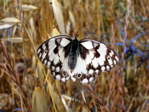 Melanargia titea, סטירית משוישת